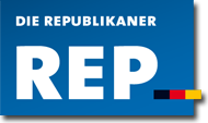 Logo der Partei Die Republikaner